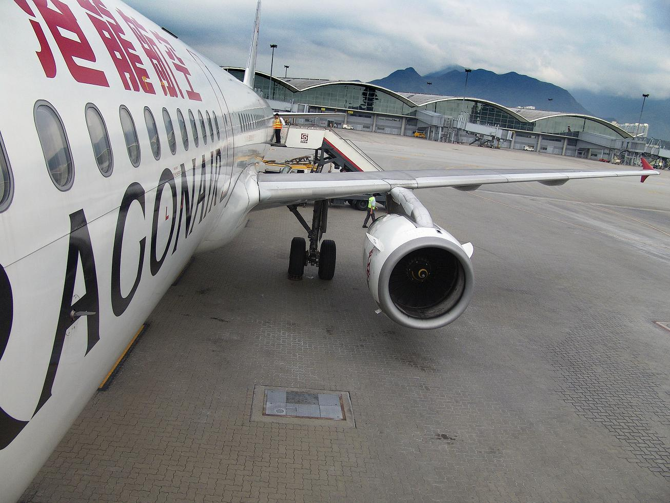 Hong Kong Dragon Airlines Ltd. (Dragonair / 港龍航空有限公司) Airbus A320 at Hong Kong International Airport